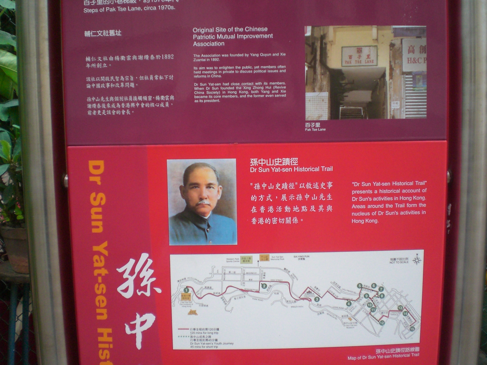 中環zh:百子里近鴨巴甸街與結志街之間